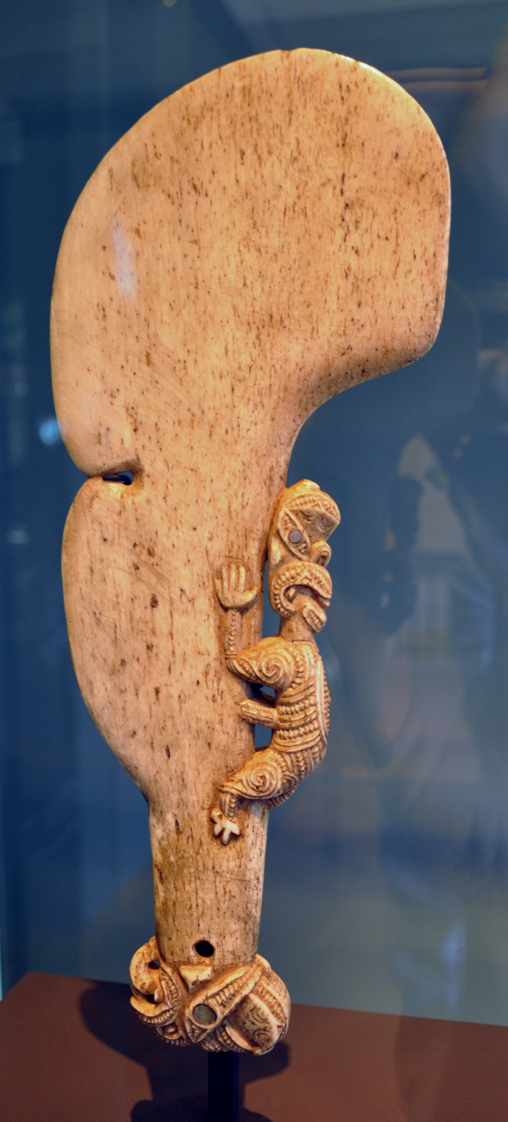 Zeremonialkeule, Neuseeland, Kultur der Maori, um 1900 Pottwalknochen, Perlmutt Museum Rietberg, Zürich; Geschenk Eduard von der Heydt, Inv. Nr. RPO 5